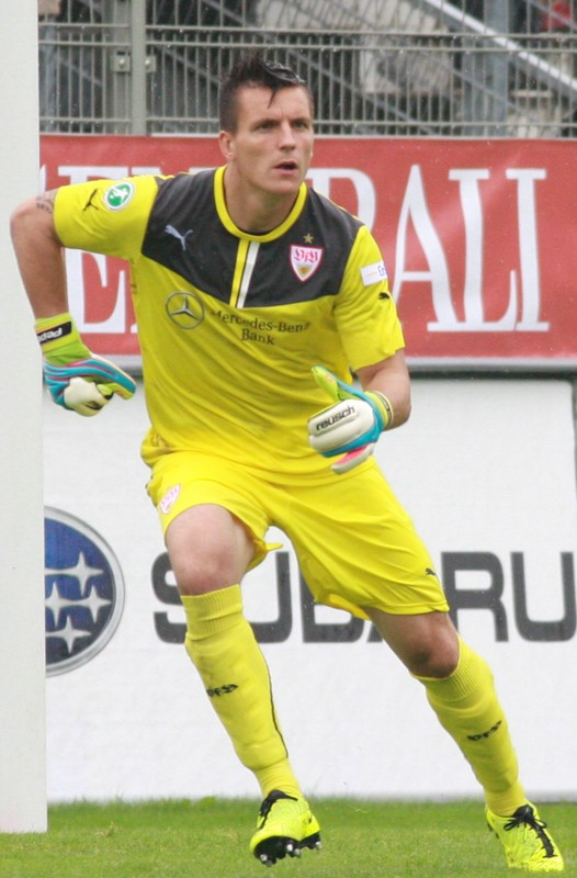 Kevin Müller für den VfB II beim Spiel gegen die Stuttgarter Kickers. Aufgenommen von